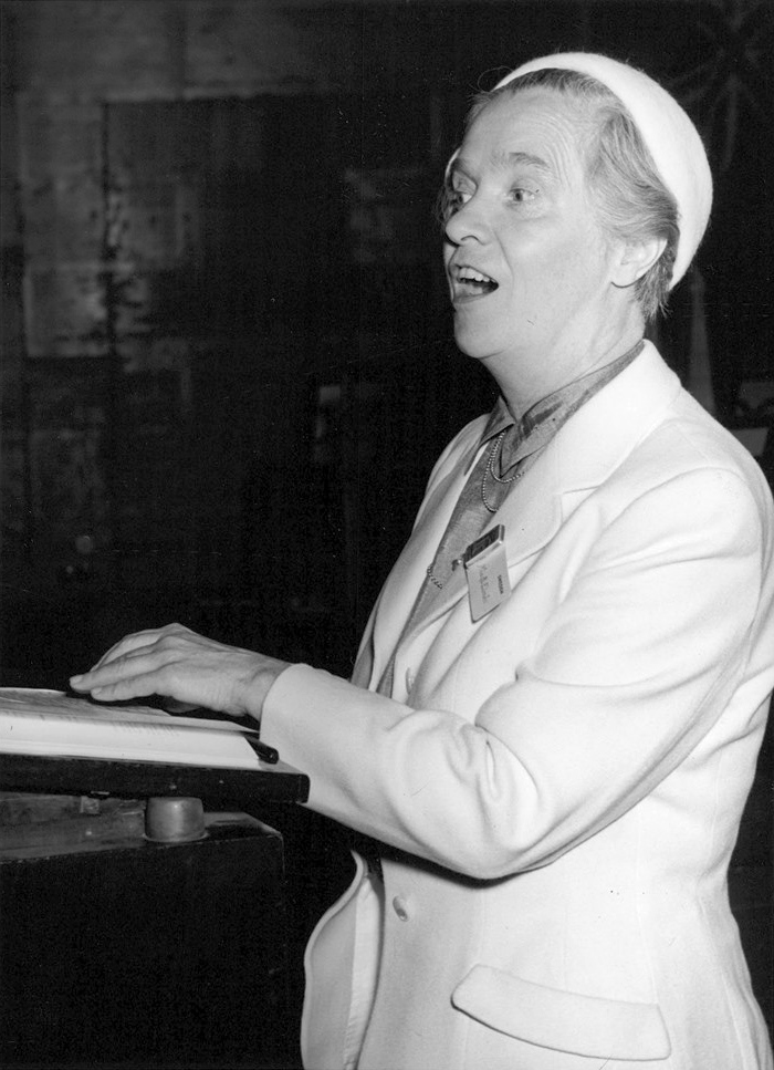 Brita Elmén invigningstalar på yrkeskvinnors samarbetsförbunds kongress, 5 juli 1953.